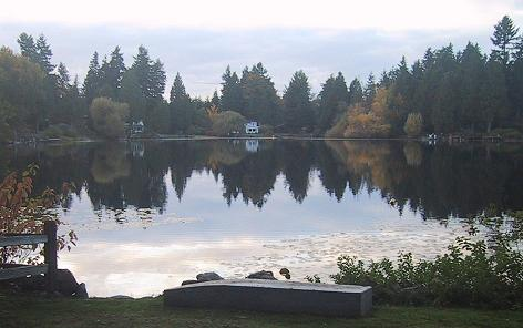 Foto de Haller Lake (Seatlo) en 2006